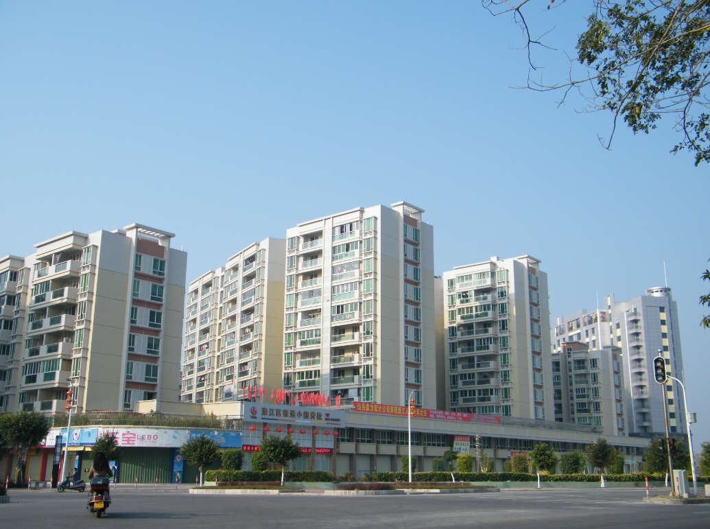 磊广路望濠江花园